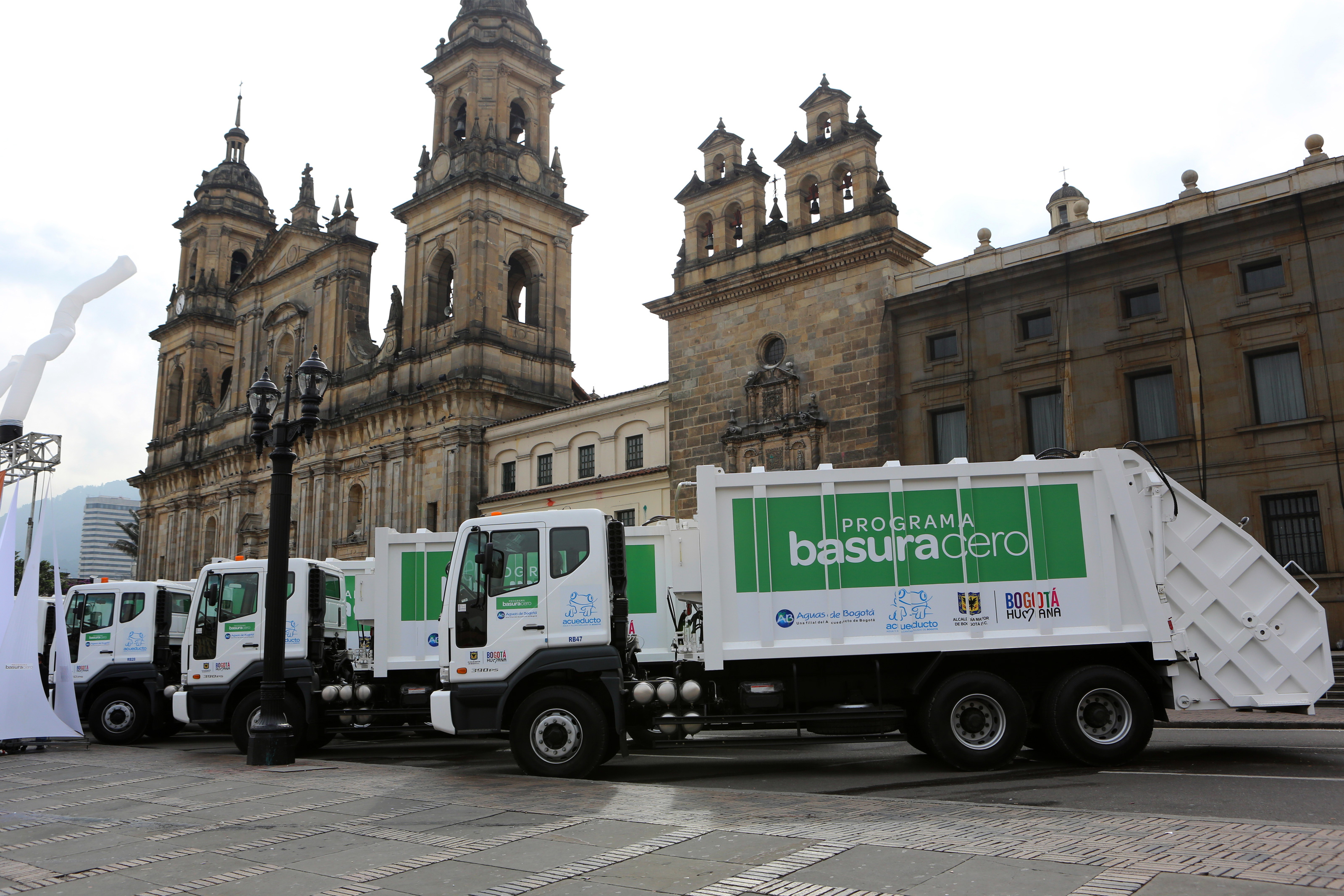 english